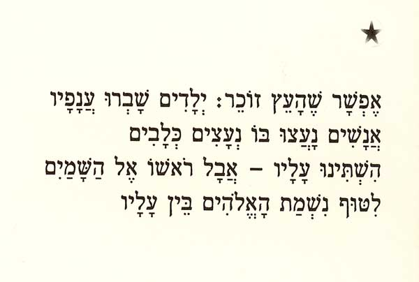 מילות השיר "אפשר שהעץ זוכר" מתוך הספר והאלבום "ריקוד המשוגעת"